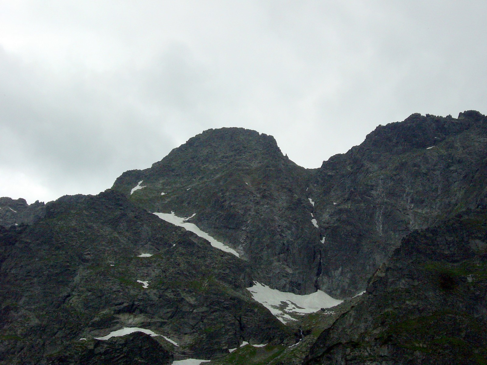 Mięguszowiecki Szczyt Czarny znad Morskiego Oka